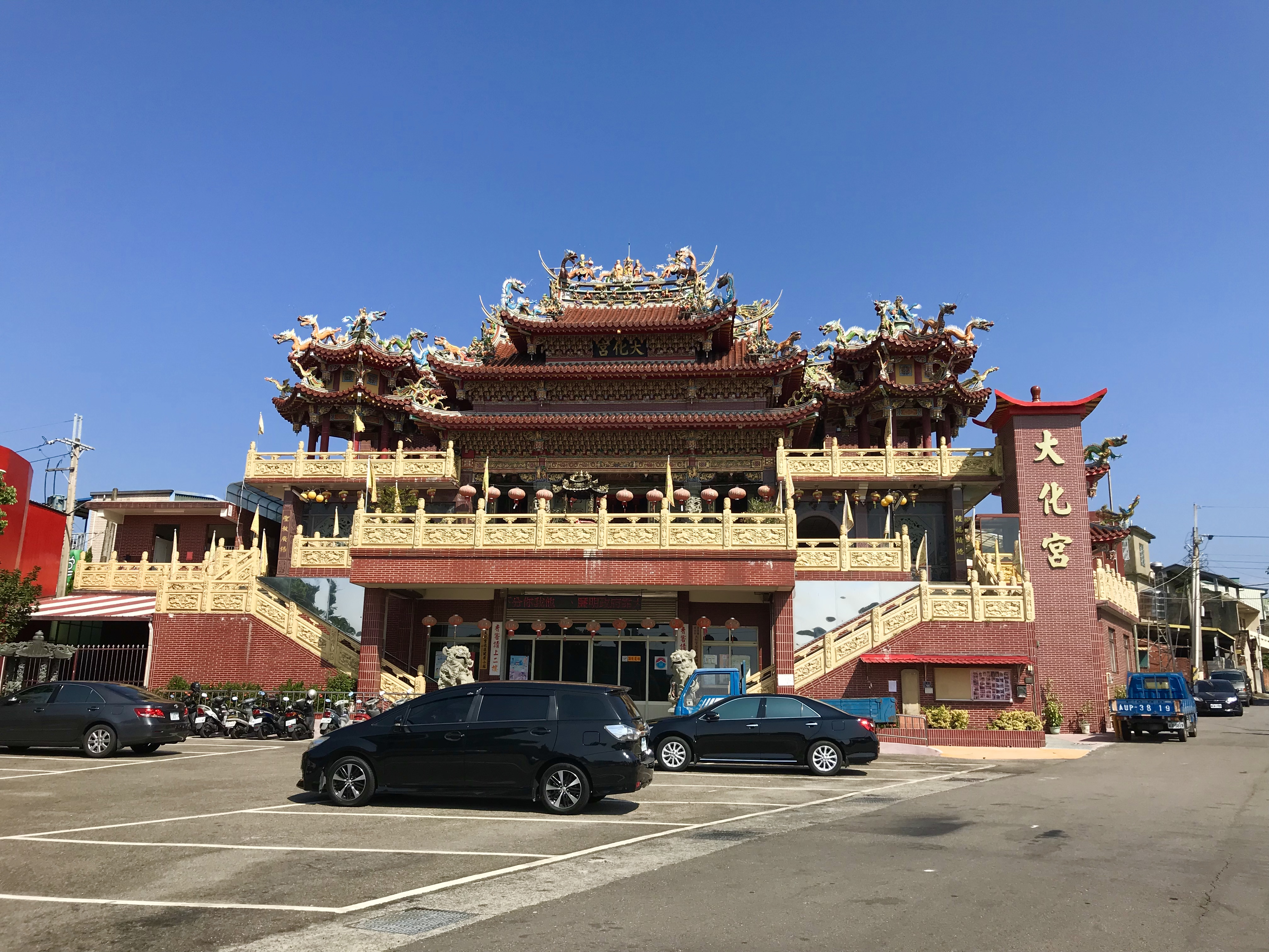 頭份大化宮遠照